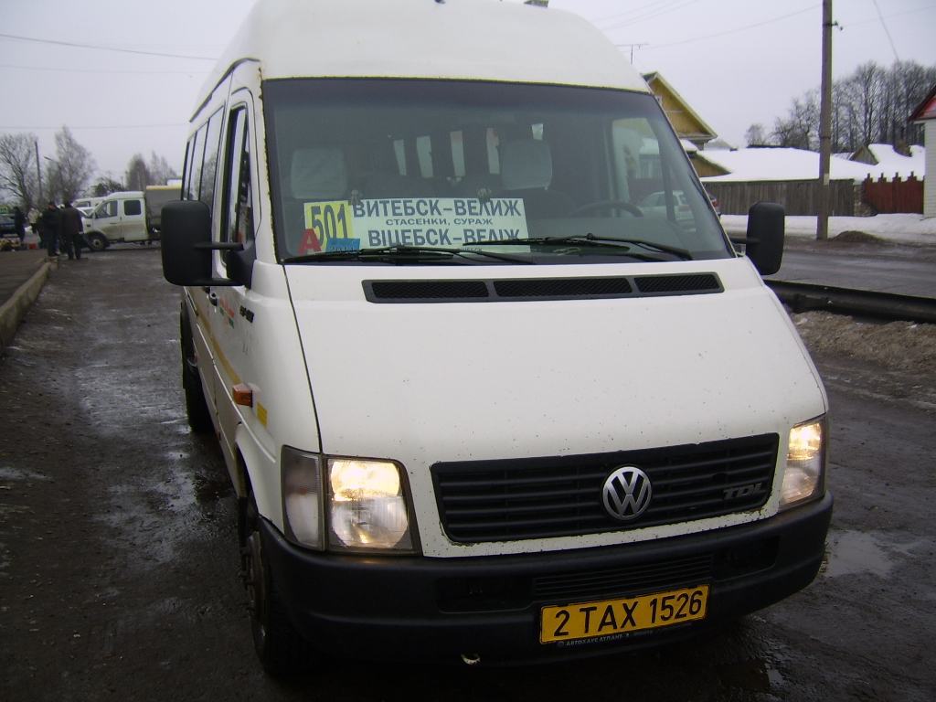 be:Горад Веліж